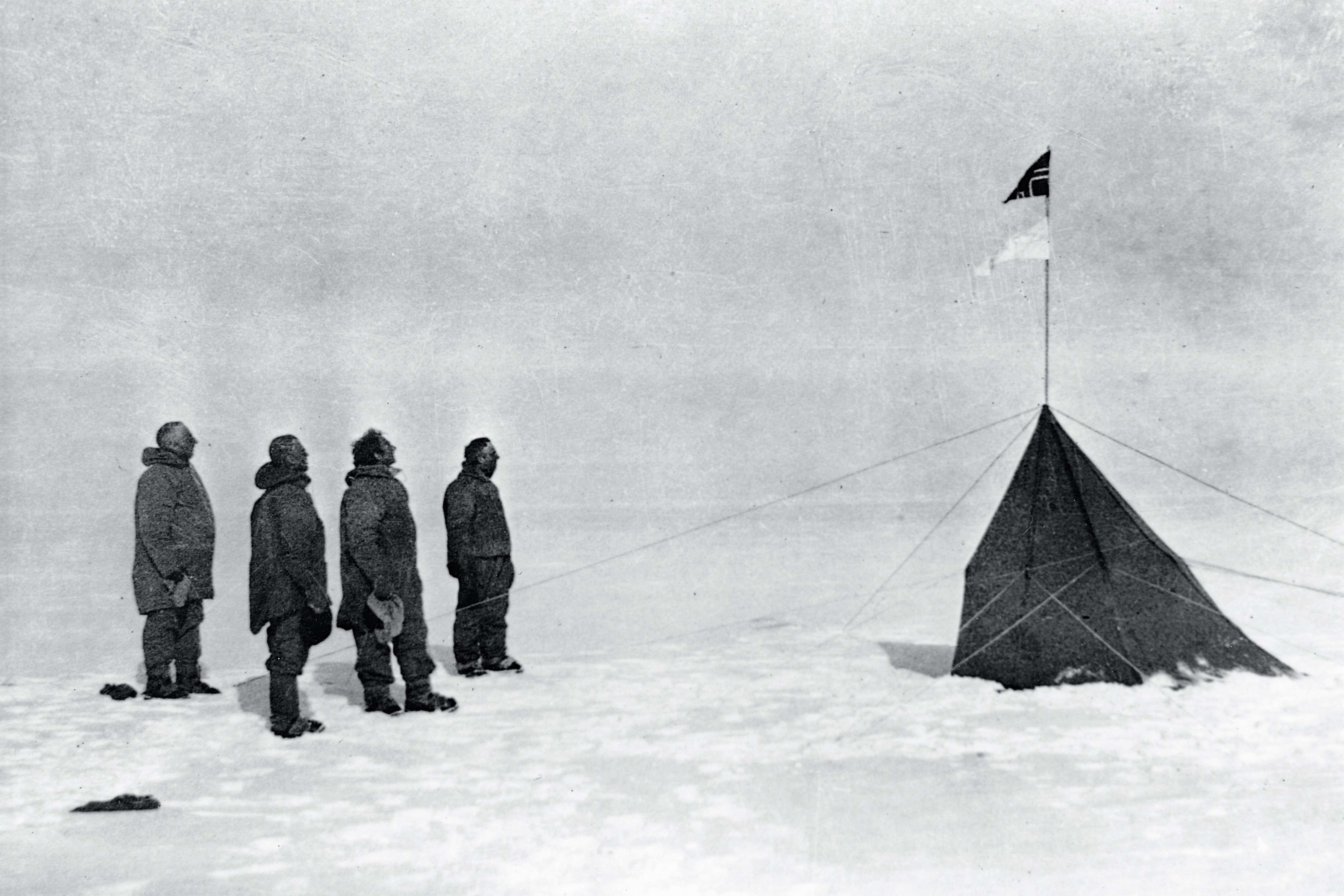 Aan de Zuidpool